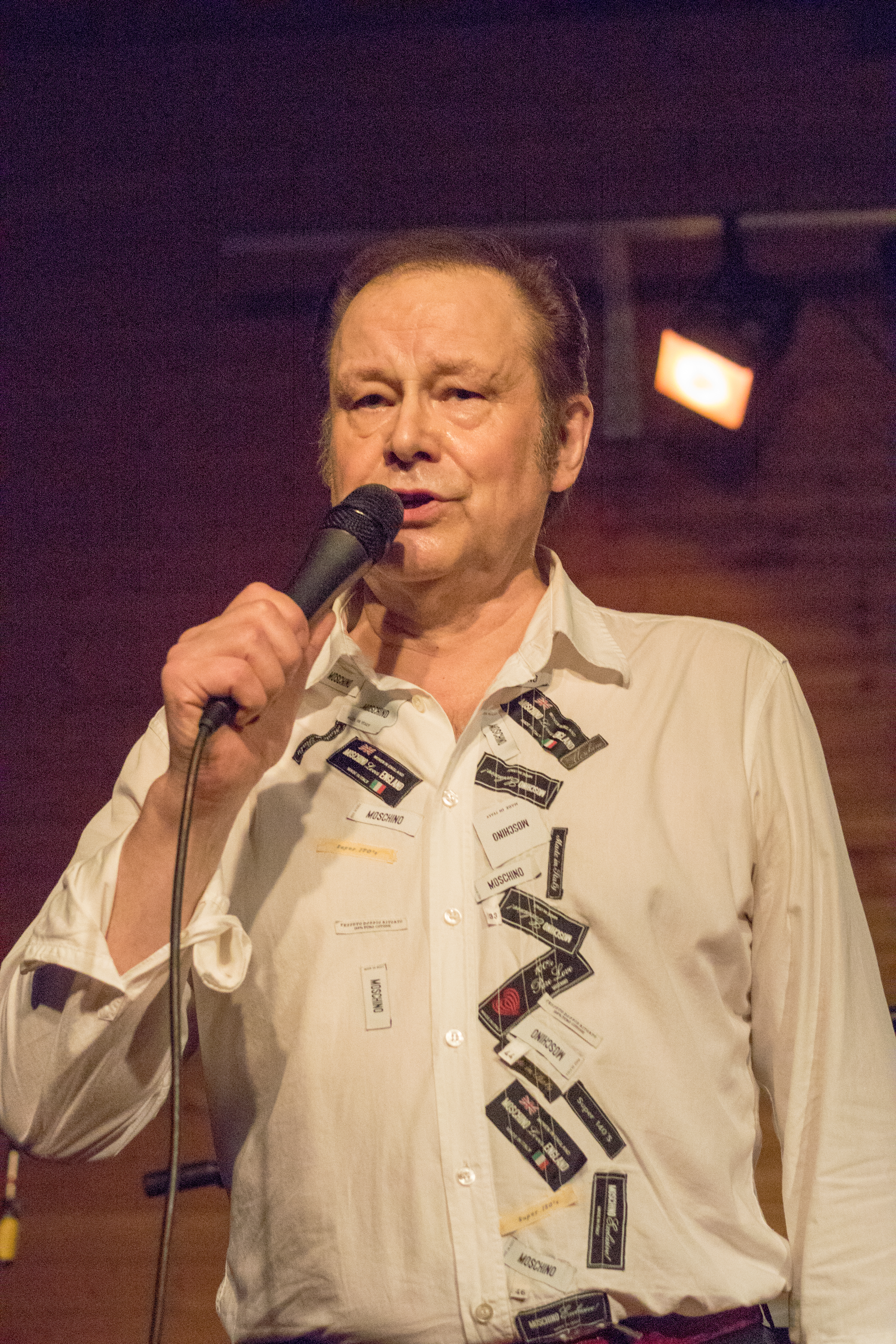 Tapani Kansa suomalainen laulaja